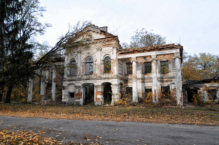 Руїни палацу Браницьких в Рудому Селі